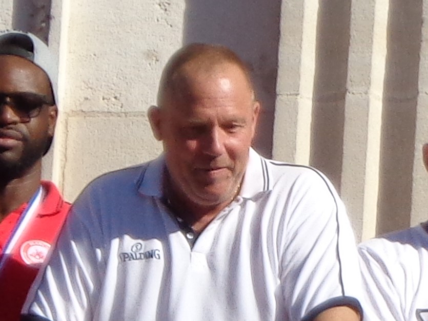 Jean-Denys Choulet, entraineur de l'Elan Chalon en 2017.